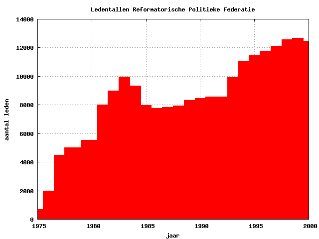 Door mijzelf met gnuplot gemaakte grafiek op basis van openbare DNPP-informatie